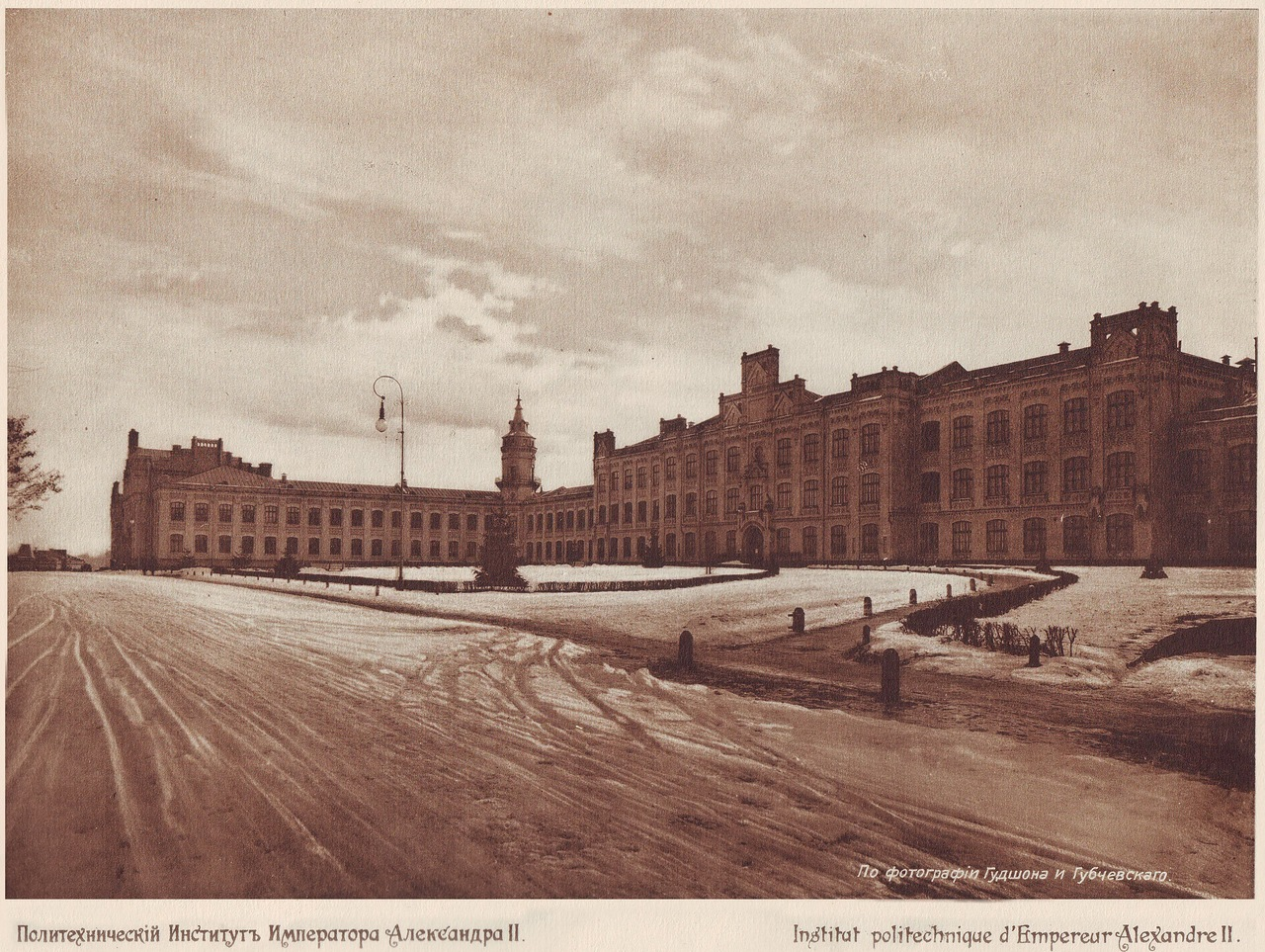 Політехнічний інститут Київ 1911